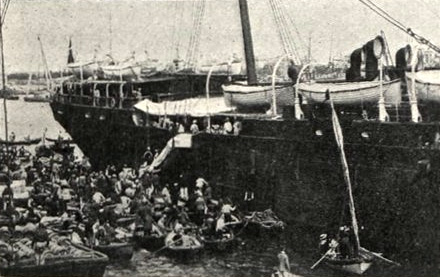 Llegada de los supervivientes del destacamento de Baler el 2 de septiembre de 1899 al puerto de Barcelona.Fotografía aparecida en el artículo "Los héroes de Baler", publicado en el número 19 de IRIS. Revista Semanal Ilustrada, de Barcelona. El pie de foto dice: Aguardando el desembarco de los héroes de Baler.